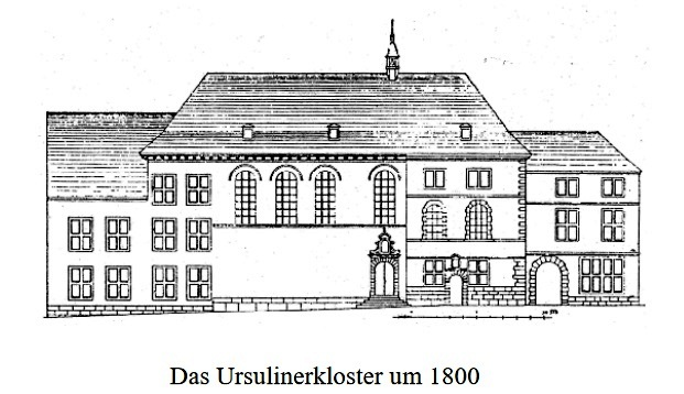 ehemaliges Ursulinenkloster Aachen, Ursulinenstraße / vormals Aldegundisstraße